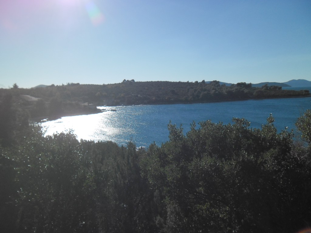 uvala Janska, Banići